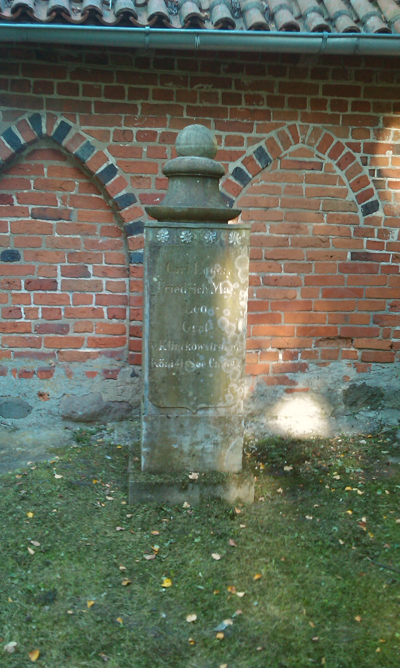 Symboliczny pomnik ofiar morskiej tragedii 1861r.